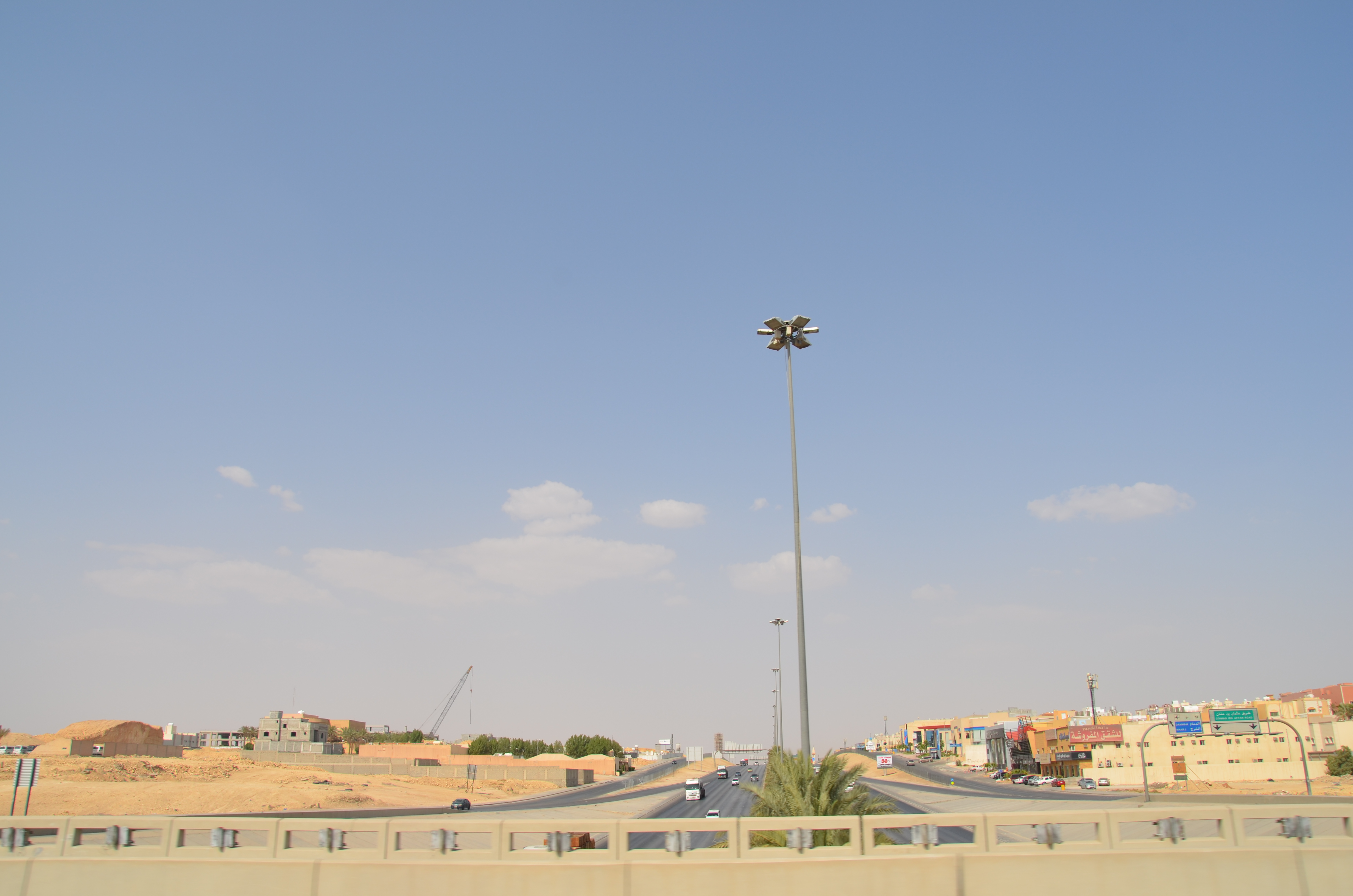 مخرج رقم 6 تقاطع طريق ابوبكر الصديق مع الدائري الشمالي الرياض المملكة العربية السعودية